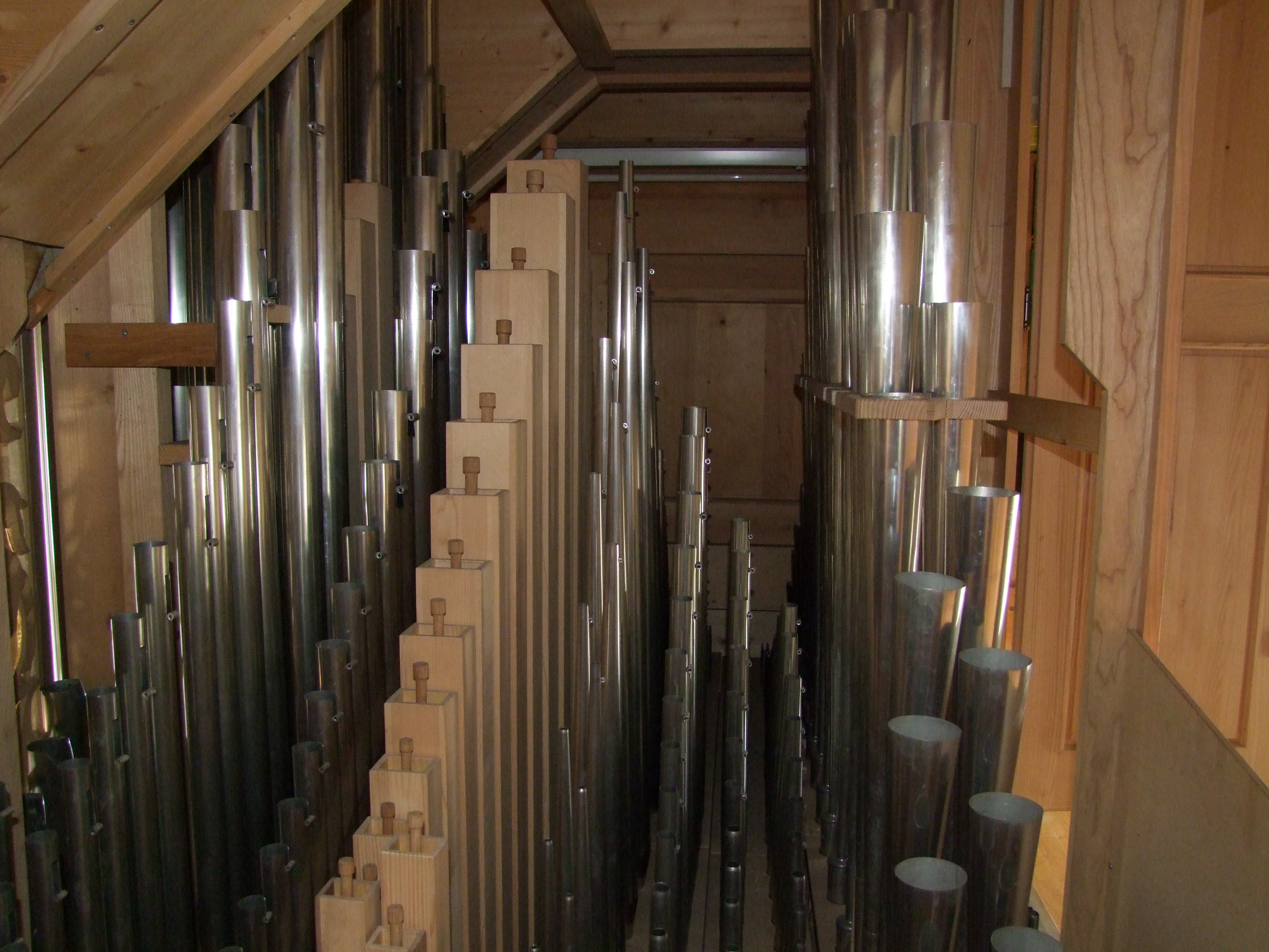 Innenleben der Orgel von St. Ulrich, Amendingen